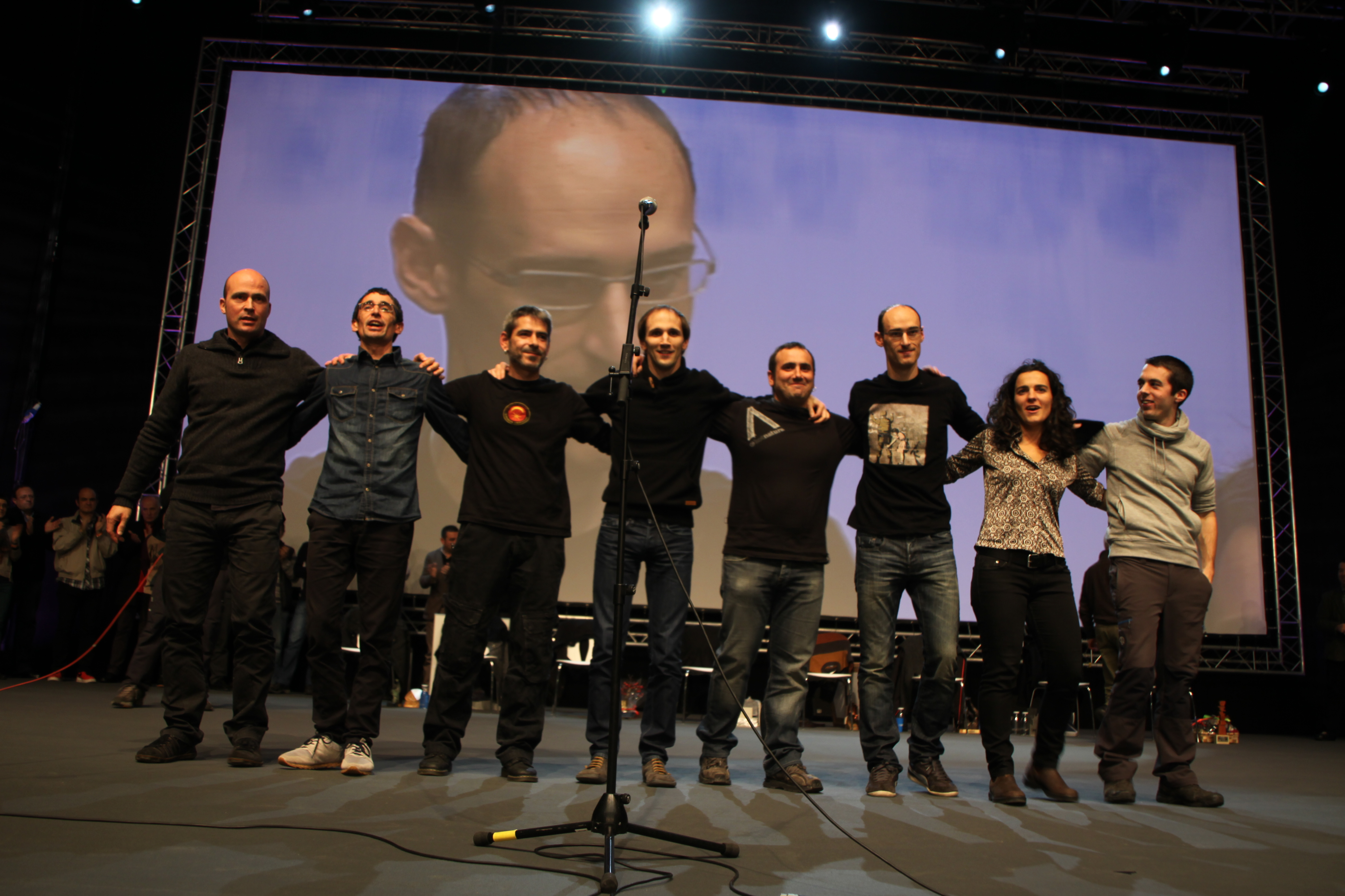 2013ko Bertsolari Txapelketa Nagusiko finalistak BECen, atzean txapeldun izan zen Amets Arzallus dutela.